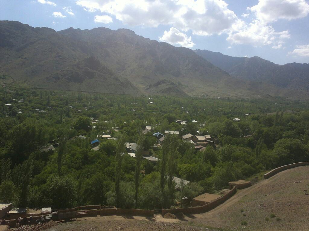 Тоҷикӣ: Mullomir village in Tajikistan enwiki и Мулломир село в Таджикистане ва Мулломир деха дар Тоҷикистон